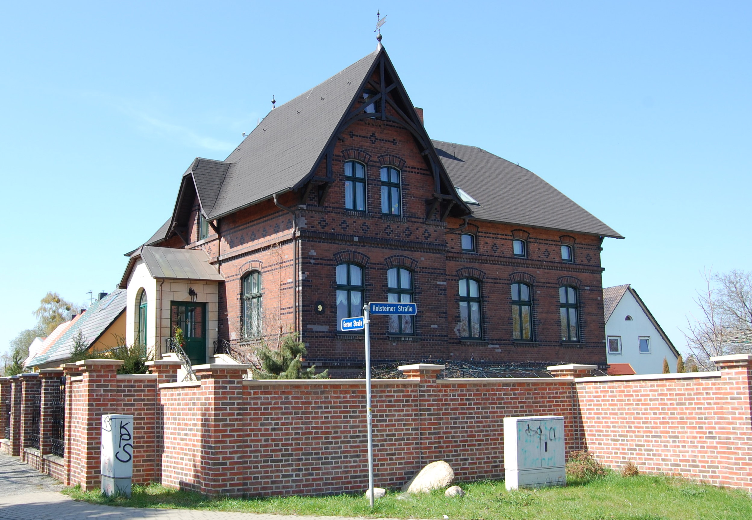 Fischersche Villa, Holsteiner Straße, Magdeburg-Westerhüsen